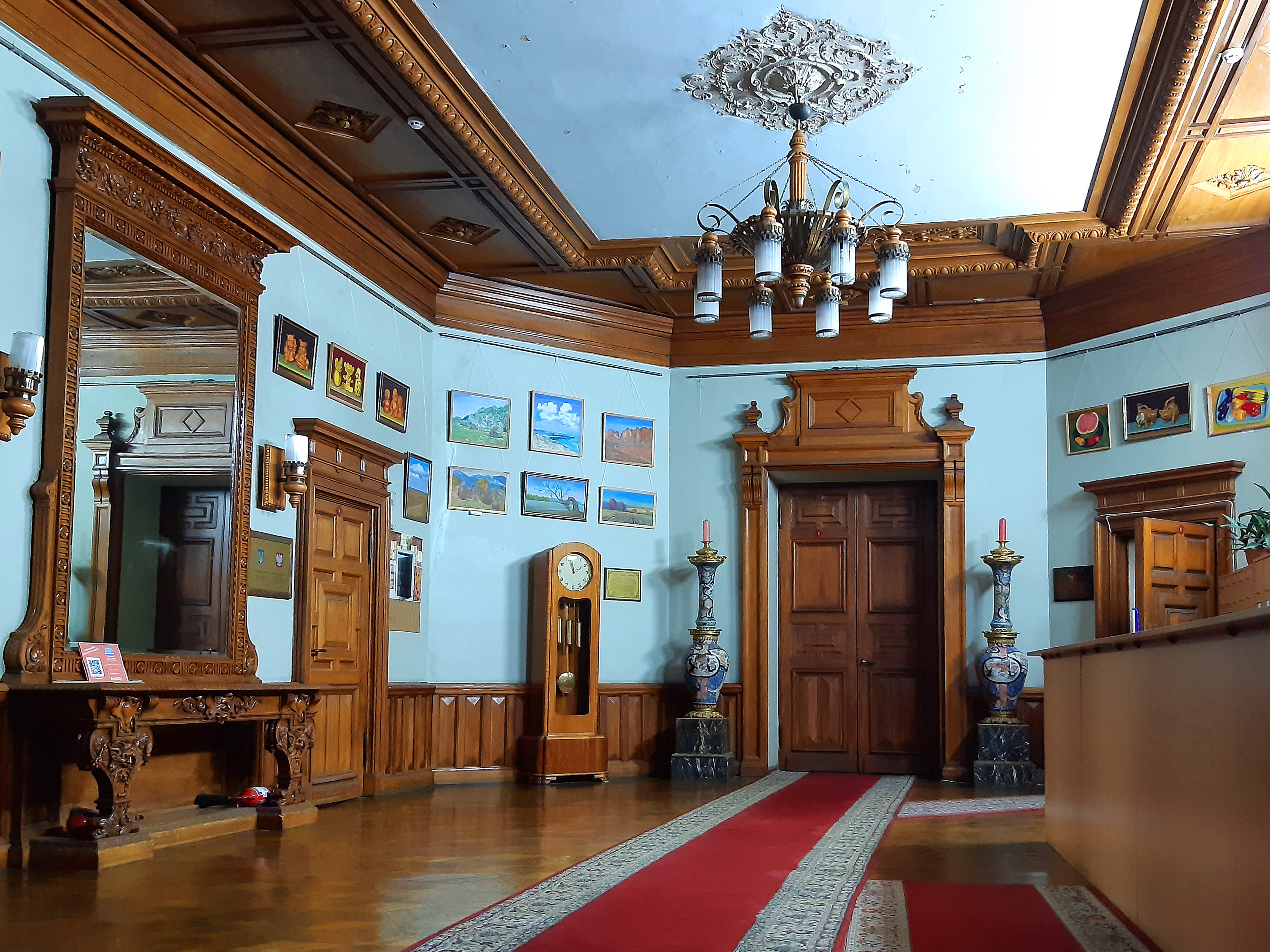 Хол. Особняк Олександра Терещенка (Республіканська медична бібліотека), Київ, вул. Л. Толстого, 07/2